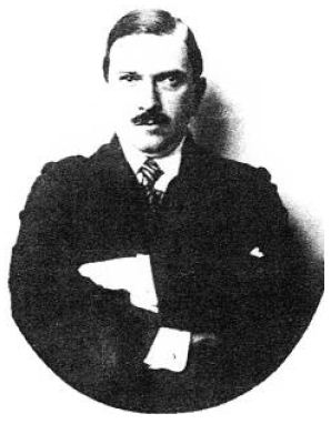 Kormos Tivadar (1881-1946) geológus, paleontológus portréja